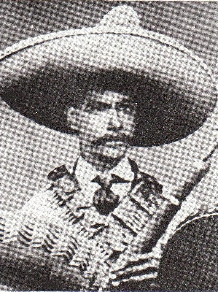 Fotografía del General Rebocato Aguilar